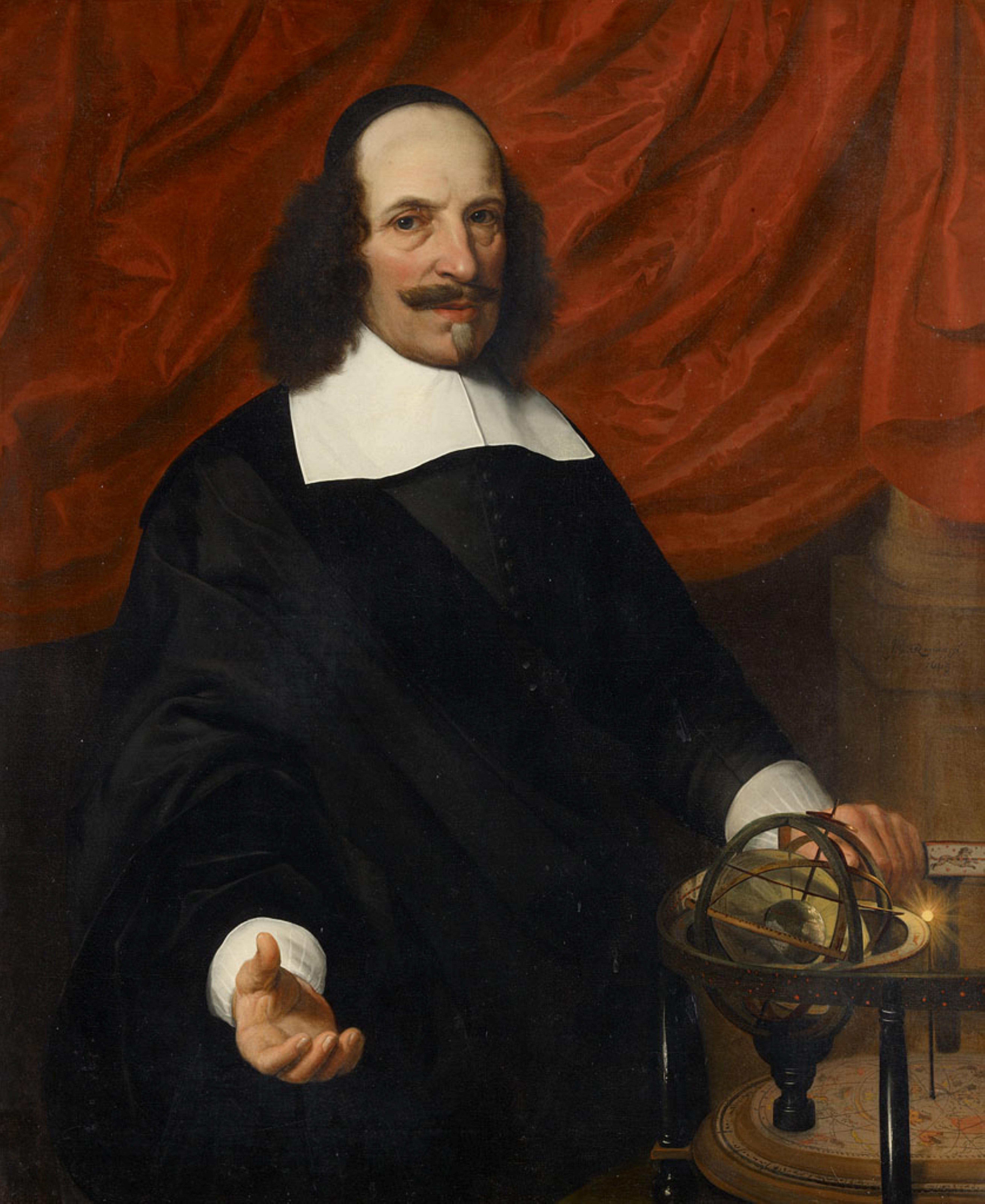 Joan Blaeu (1596-1673) zette de cartografische uitgeverij voort van zijn vader Willem Blaeu (1573-1638). Zijn ‘Grooten Atlas oft Wereldbeschrijving’ in negen delen (Amsterdam 1664-1665), gold als de best uitgevoerde atlas van die tijd. Kostbaar gebonden en ingekleurde exemplaren dienden als geschenk voor vorstelijke personen en waren destijds een gewild object voor verzamelaars. Een andere beroemde uitgave was zijn Nederlandse stedenatlas uit 1652. Blaeu’s linkerhand rust op een tellurium, een instrument waarmee men de bewegingen van de aarde aanschouwelijk kon maken. In 1672, een jaar voor de dood van Joan Blaeu, ging de drukkerij met negen drukpersen, ‘De negen muzen’ geheten, door brand verloren.